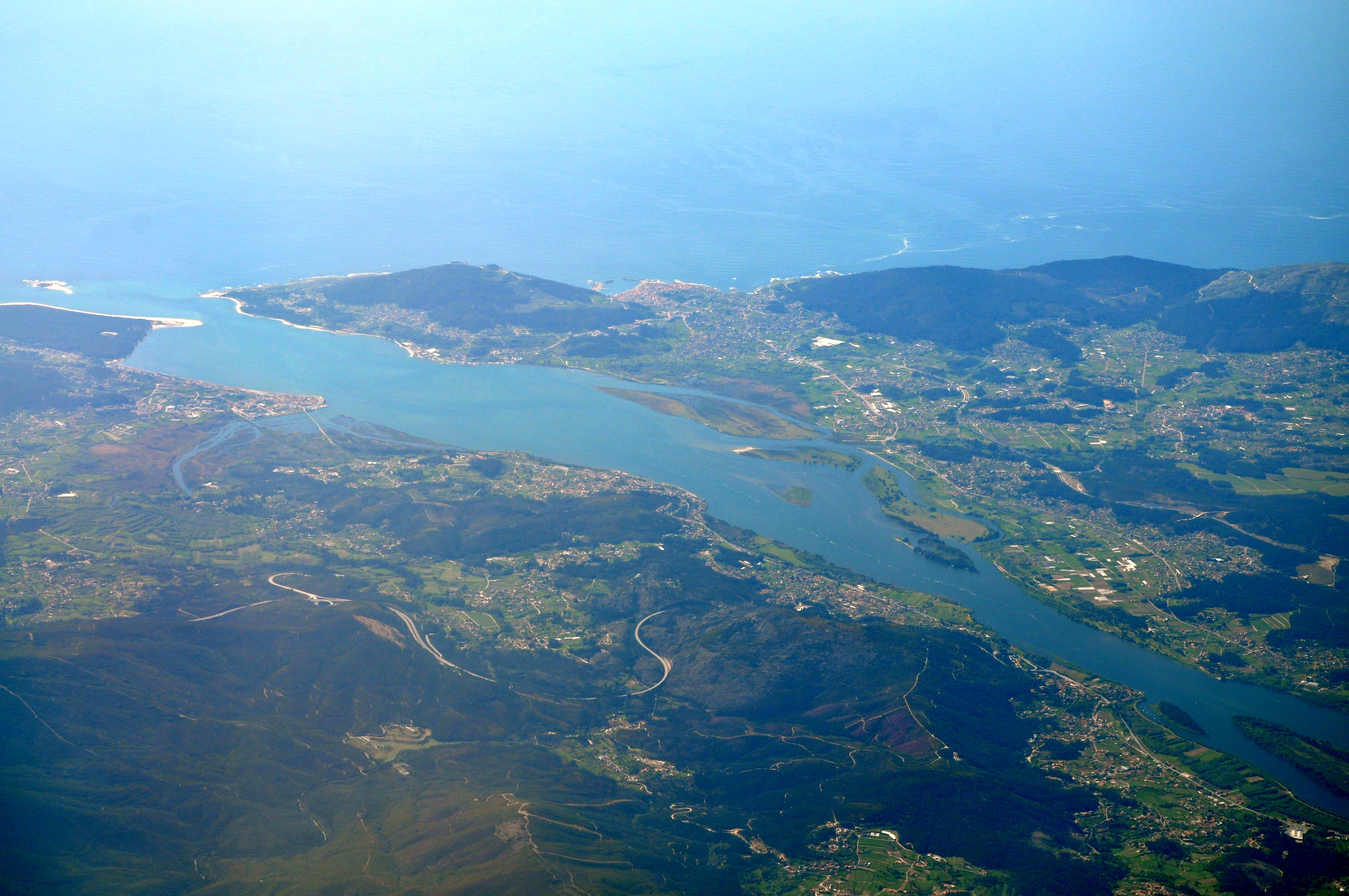 Caminha